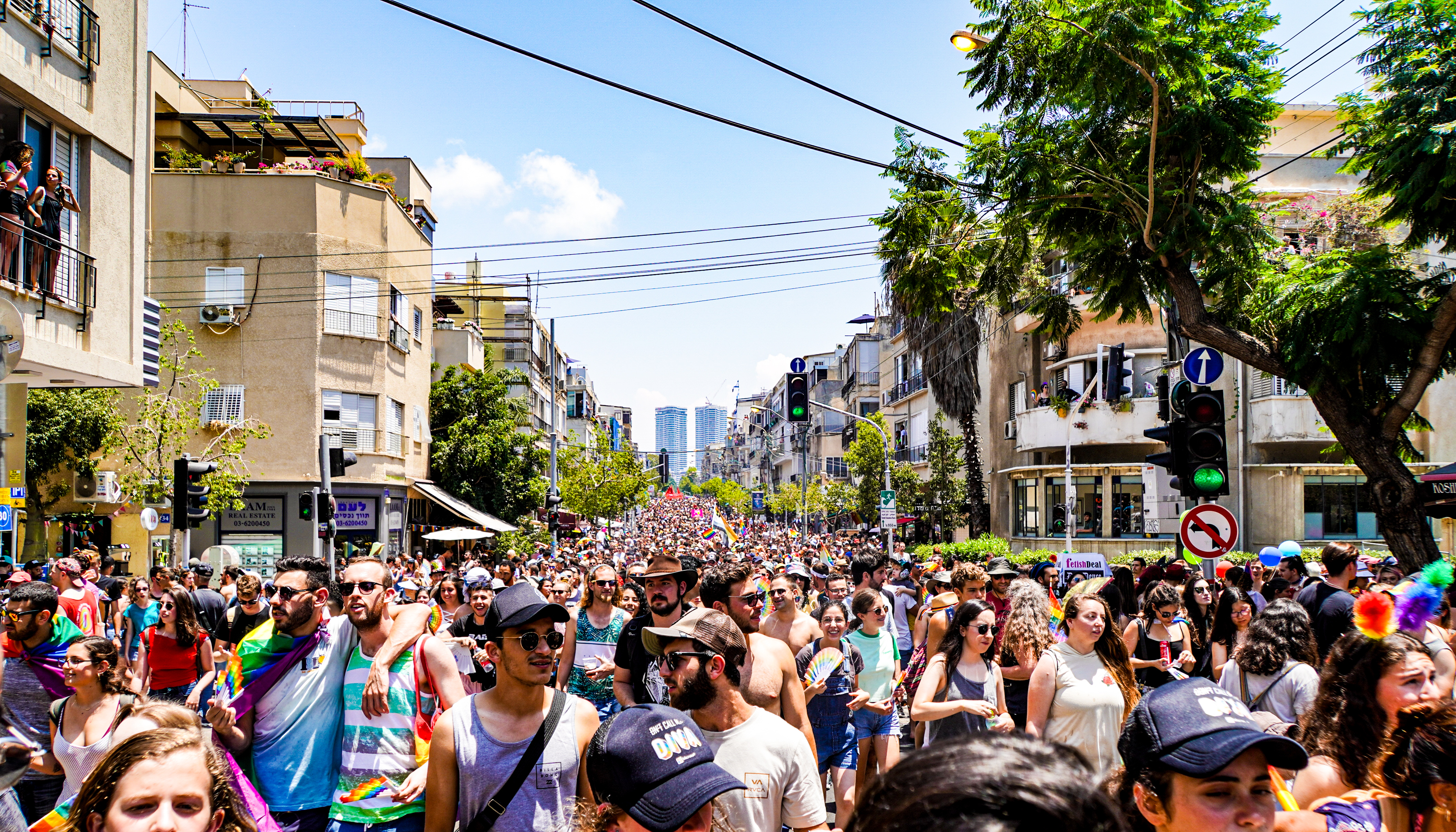 2019.06.14 Tel Aviv Pride Parade, Tel Aviv, Israel 1650024